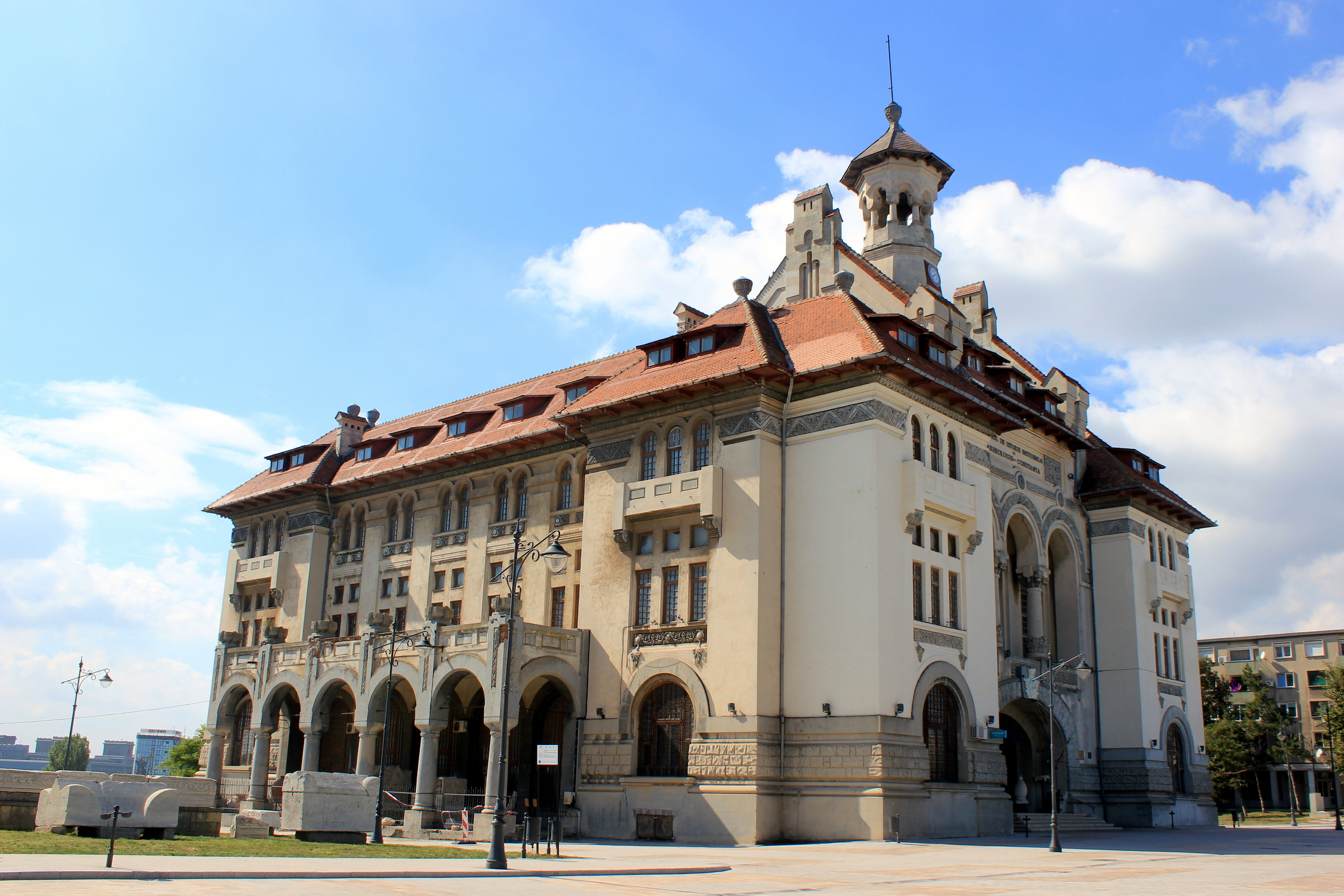 Das Nationale Historische Museum von Constanța, Rumänien.